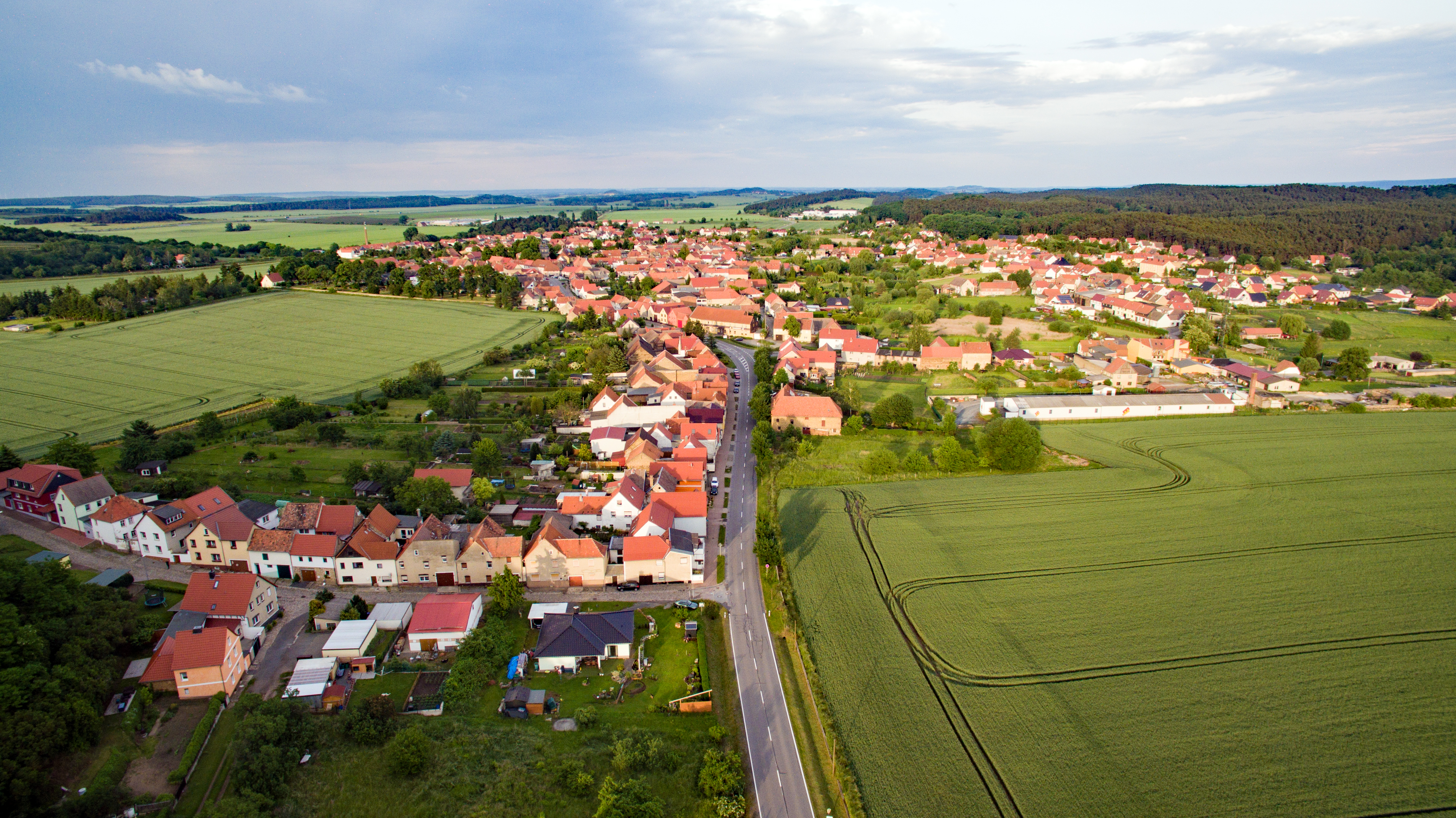 Luftbild des Ortsteils Westerhausen (Thale) am Harz